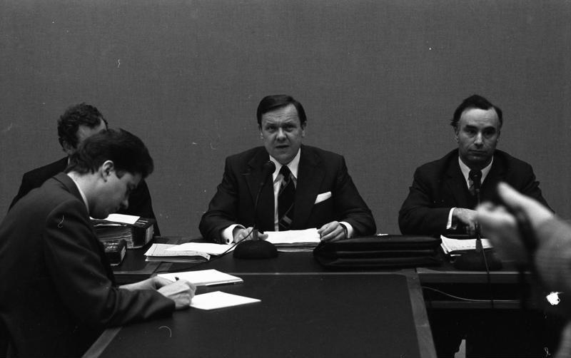 Der Parlamentarische Untersuchungsausschuß (Guillaume) vernimmt als Zeugen StS. a. D. Reinhold Merker. (Mitte: MdB-CDU Dr. Walter Wallmann)